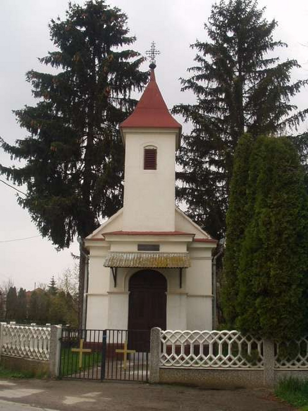 Peskovec - Chapel After